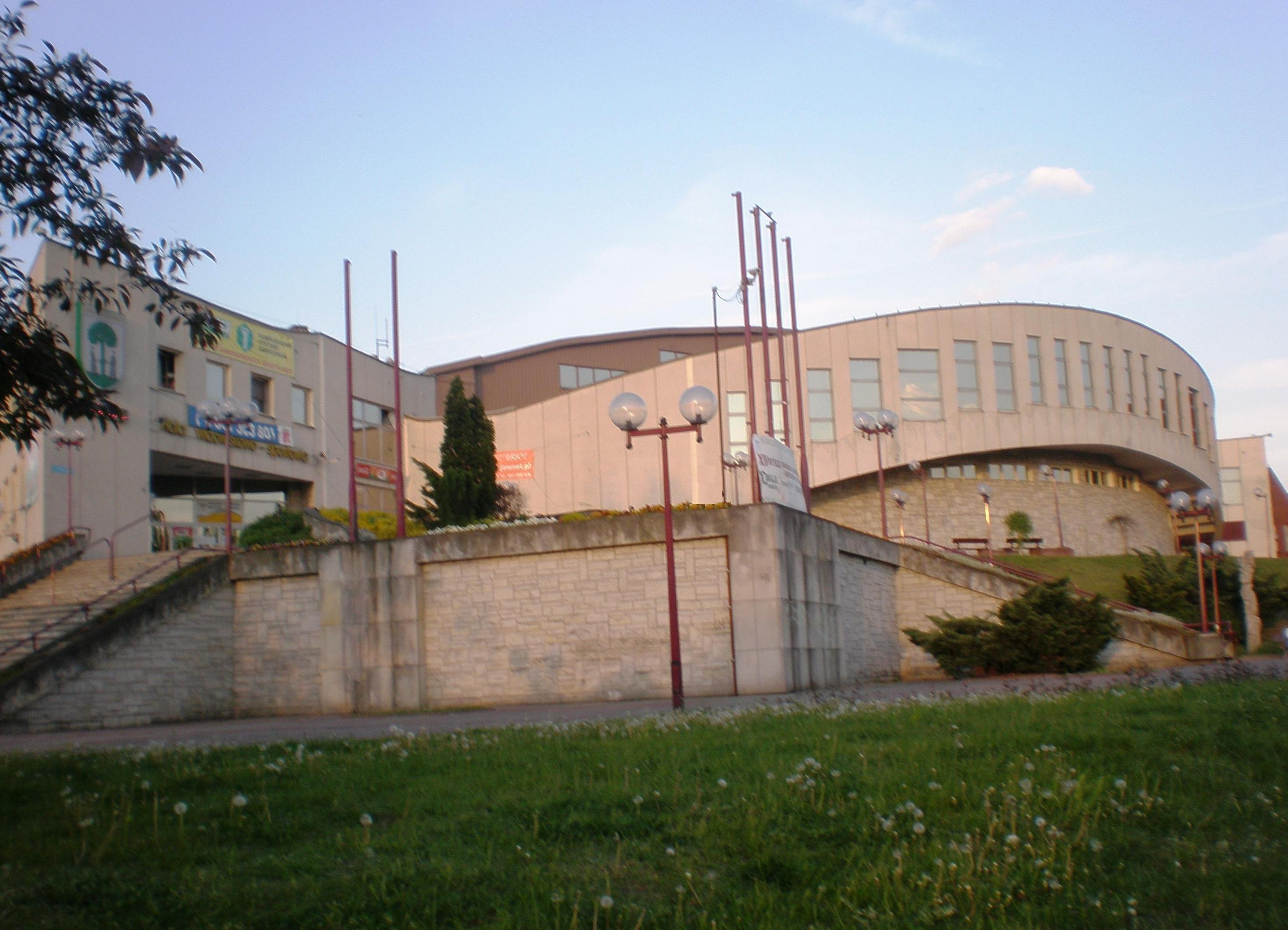 Hala Widowiskowo-Sportowa w Jaworznie.